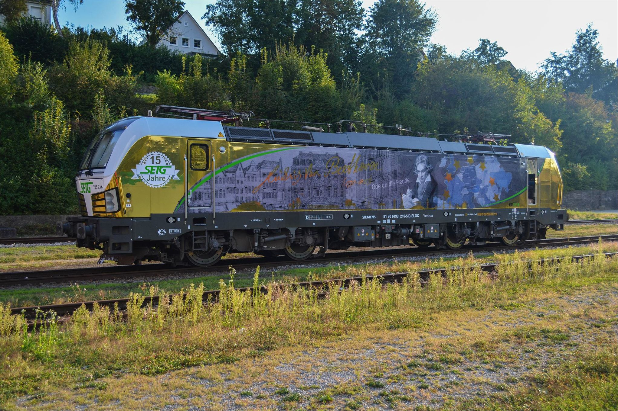 193 218 Ludwig van Beethoven